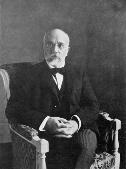 Elefterios Venizelos